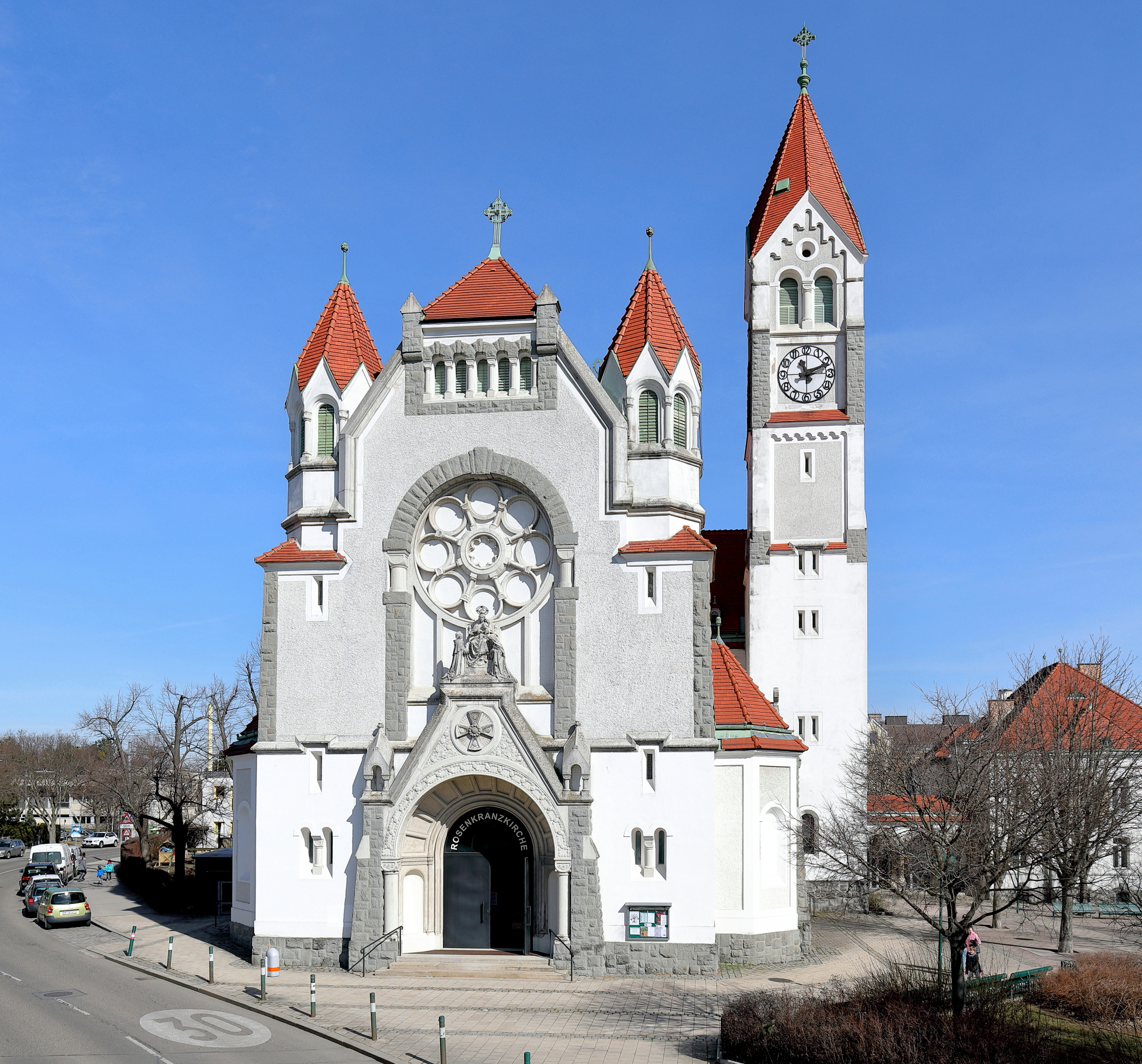 Südwestansicht der Rosenkranzkirche in Hetzendorf, ein Bezirksteil des 12. Gemeindebezirks Meidling in der österreichischen Bundeshauptstadt Wien.Die Kirche im neuromanischen Stil (mit Jugendstilelementen) wurde von 1908 bis 1909 nach Plänen von Hubert Gangl und Eugen Felgel errichtet. Die Grundsteinlegung erfolgte am 4. Juni 1908 und die Weihe auf "Heilige Maria, Königin des Hochheiligen Rosenkranzes" am 2. Oktober 1909 durch Weihbischof Godfried Marschall, unter Beisein des Kaisers Franz Joseph. Am 17. Oktober 1944 wurde die Kirche durch eine Bombe teilweise zerstört und nach dem Krieg (1953) wieder instandgesetzt.